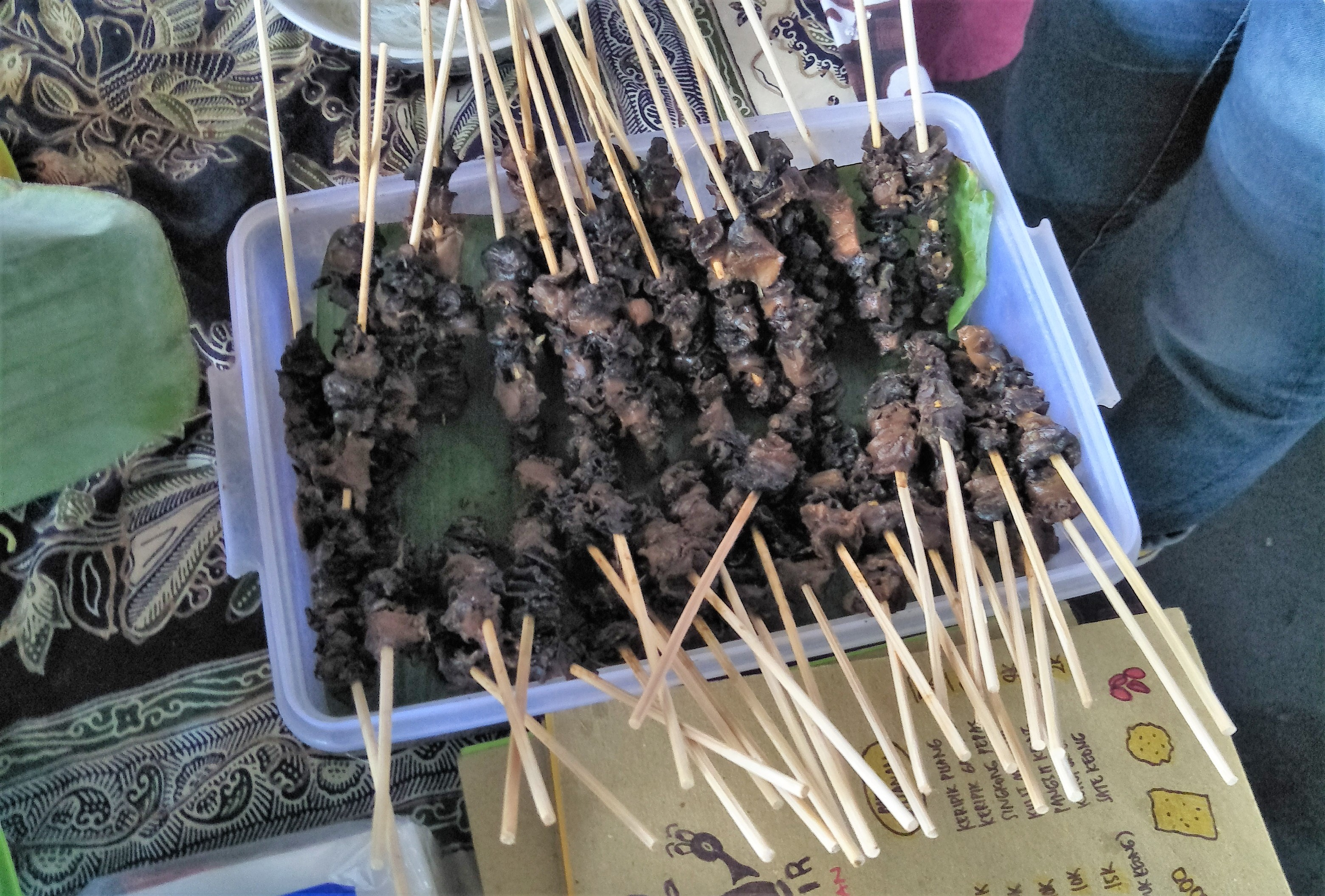 Siput yang diolah menjadi sate